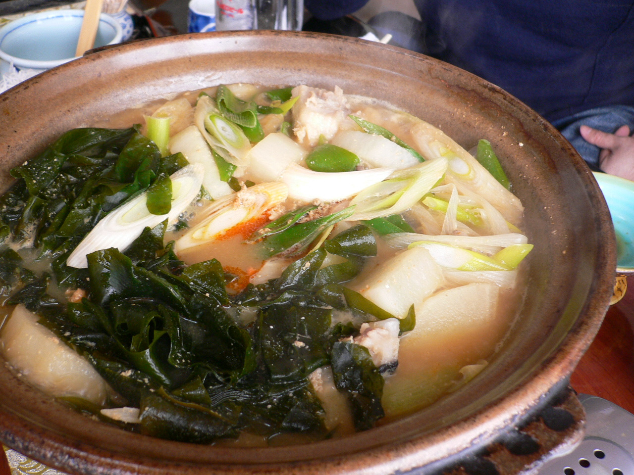 angler's nabe